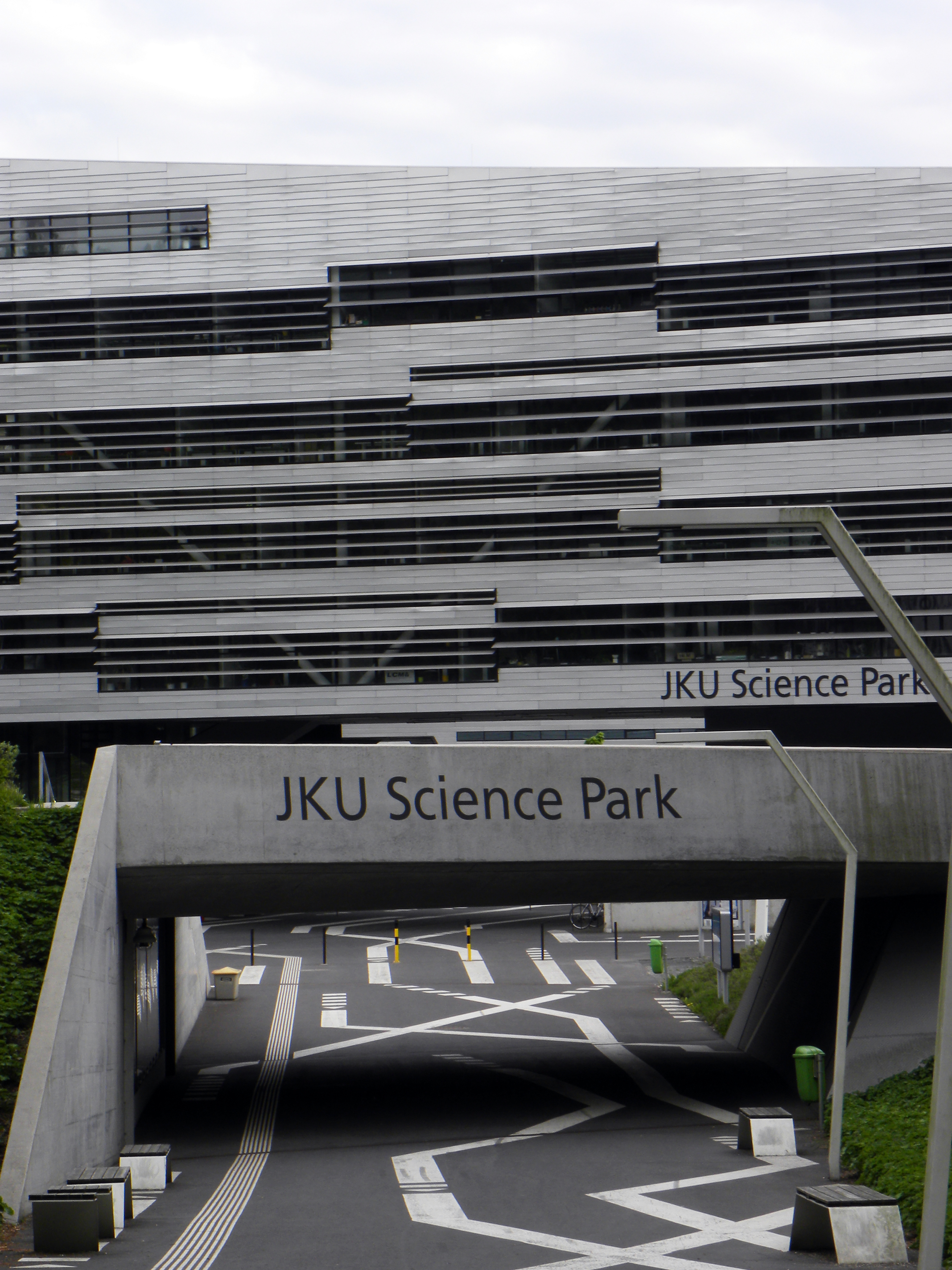 Der Science Park in der Johannes Kepler-Universität in Linz